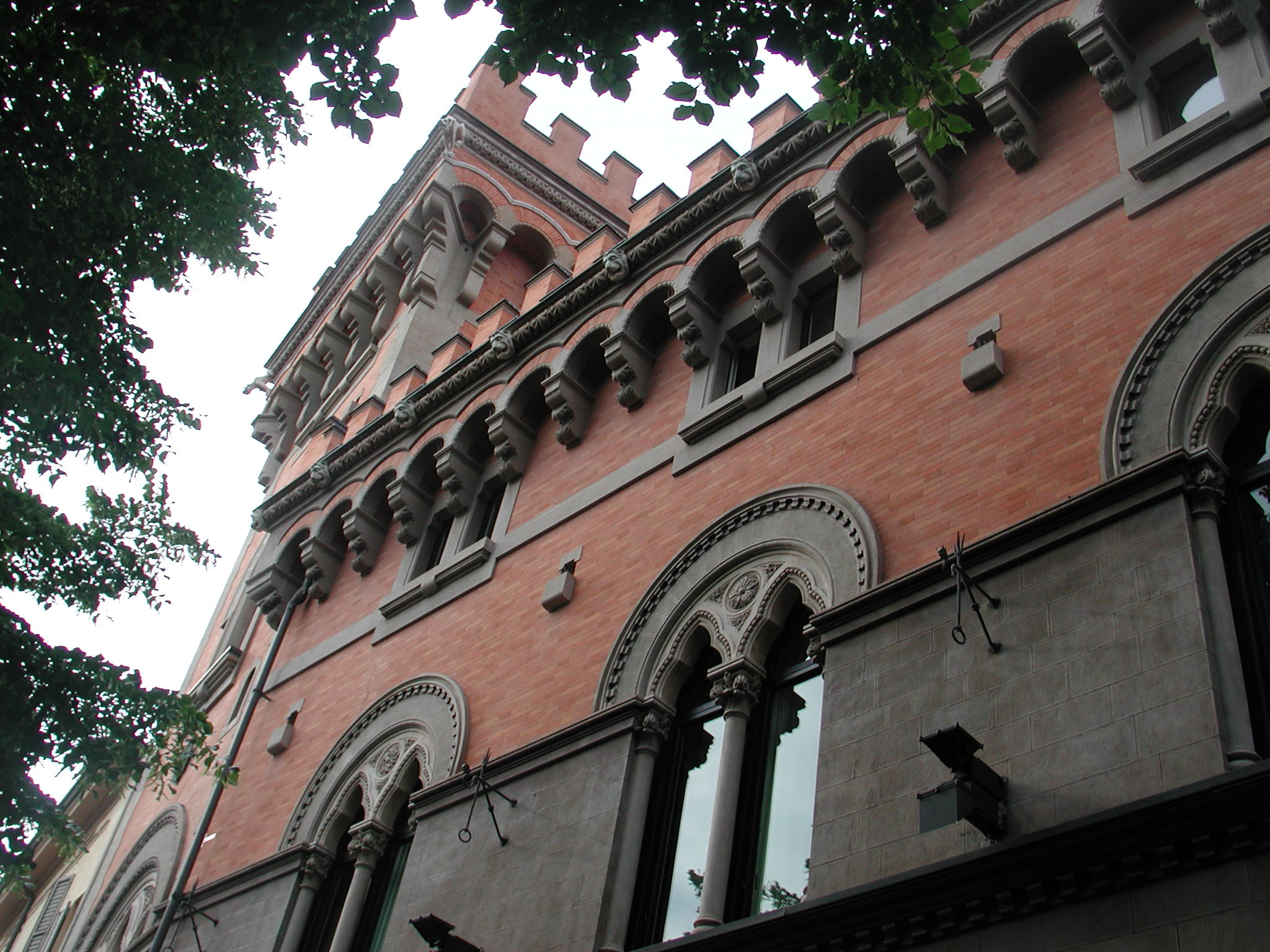 Reggio Emilia, Italy, Palaces of Reggio Emilia, palazzo Cassoli-Tirelli